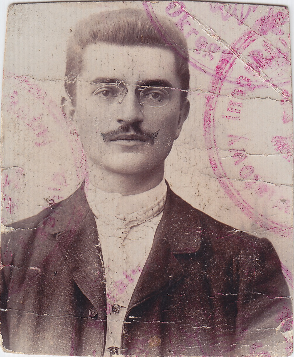 Juliusz Zieliński, nauczyciel, działacz Związku Polaków w Niemczech